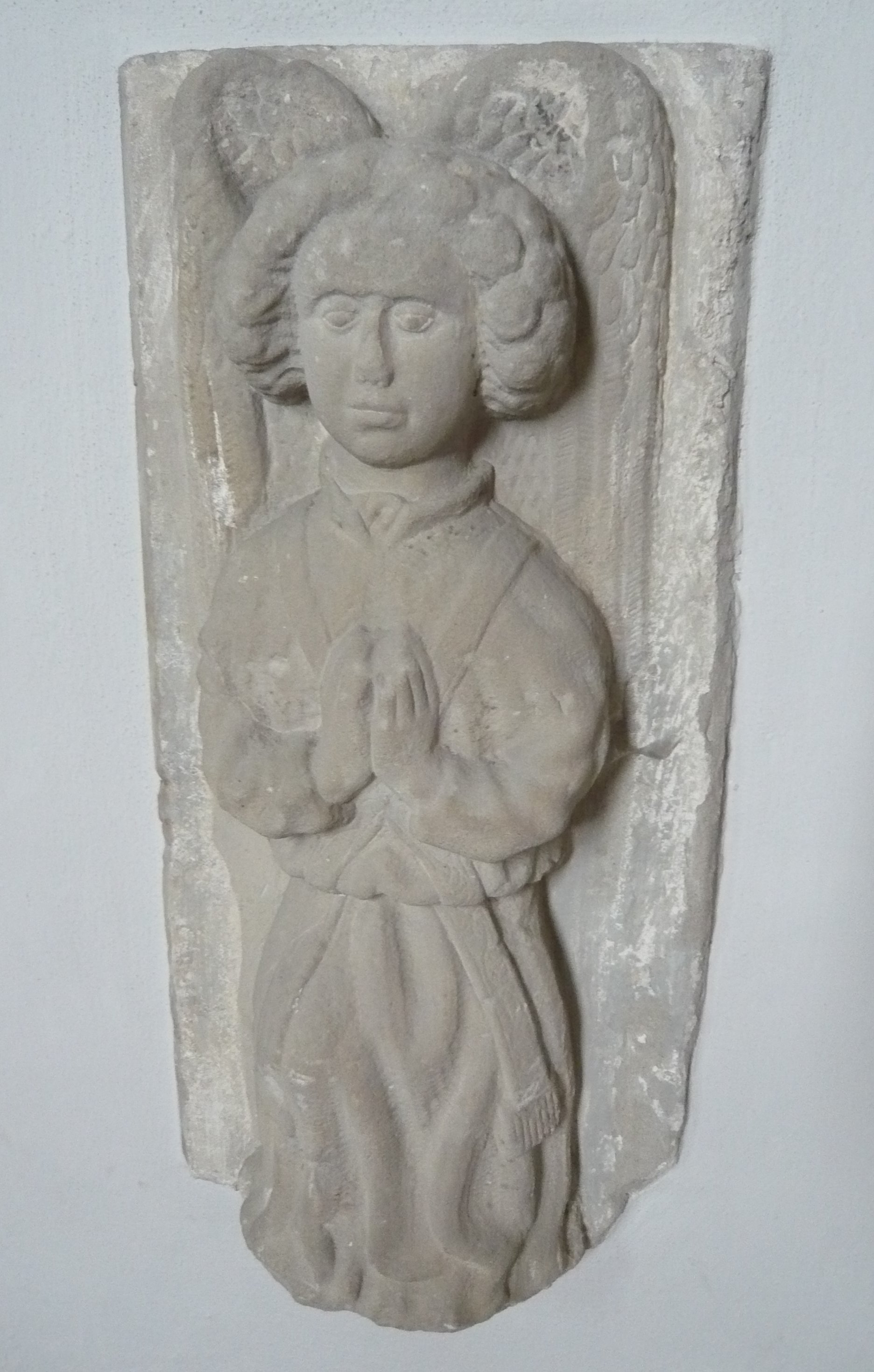 Betender Engel (gotisch), Pfarrkirche St. Nikolaus, Pfronten, Landkreis Ostallgäu